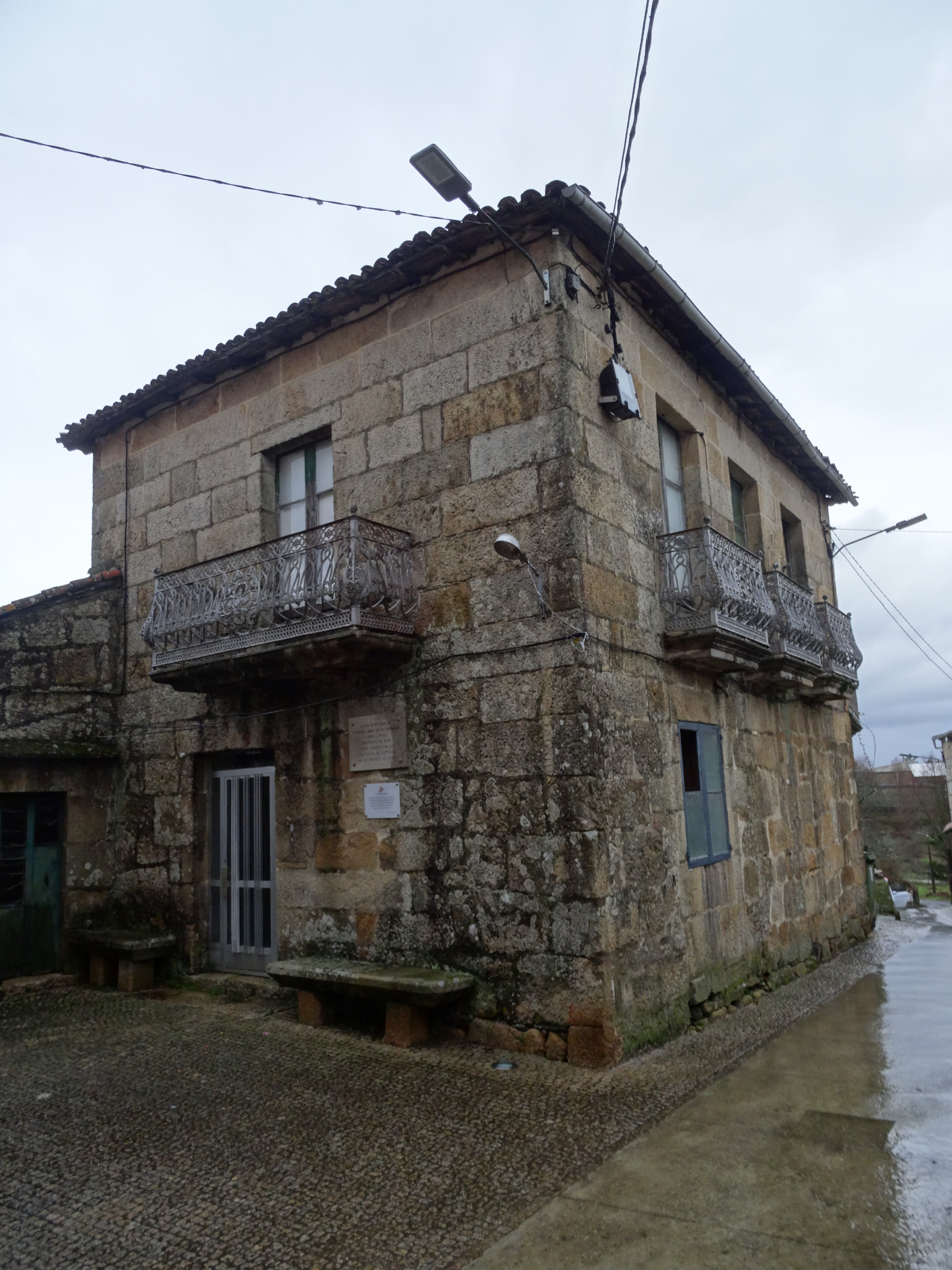 Ver título.